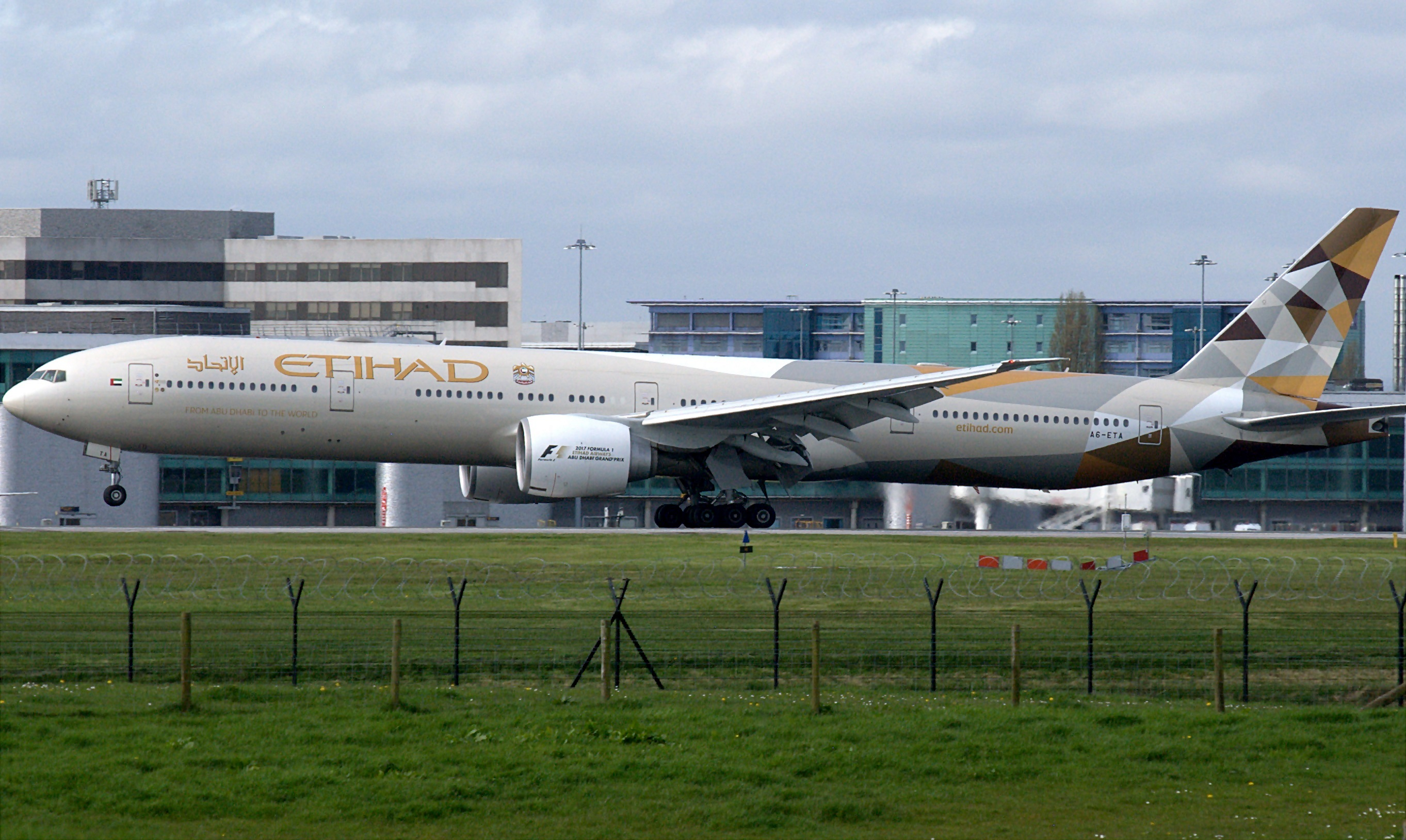 a6eta